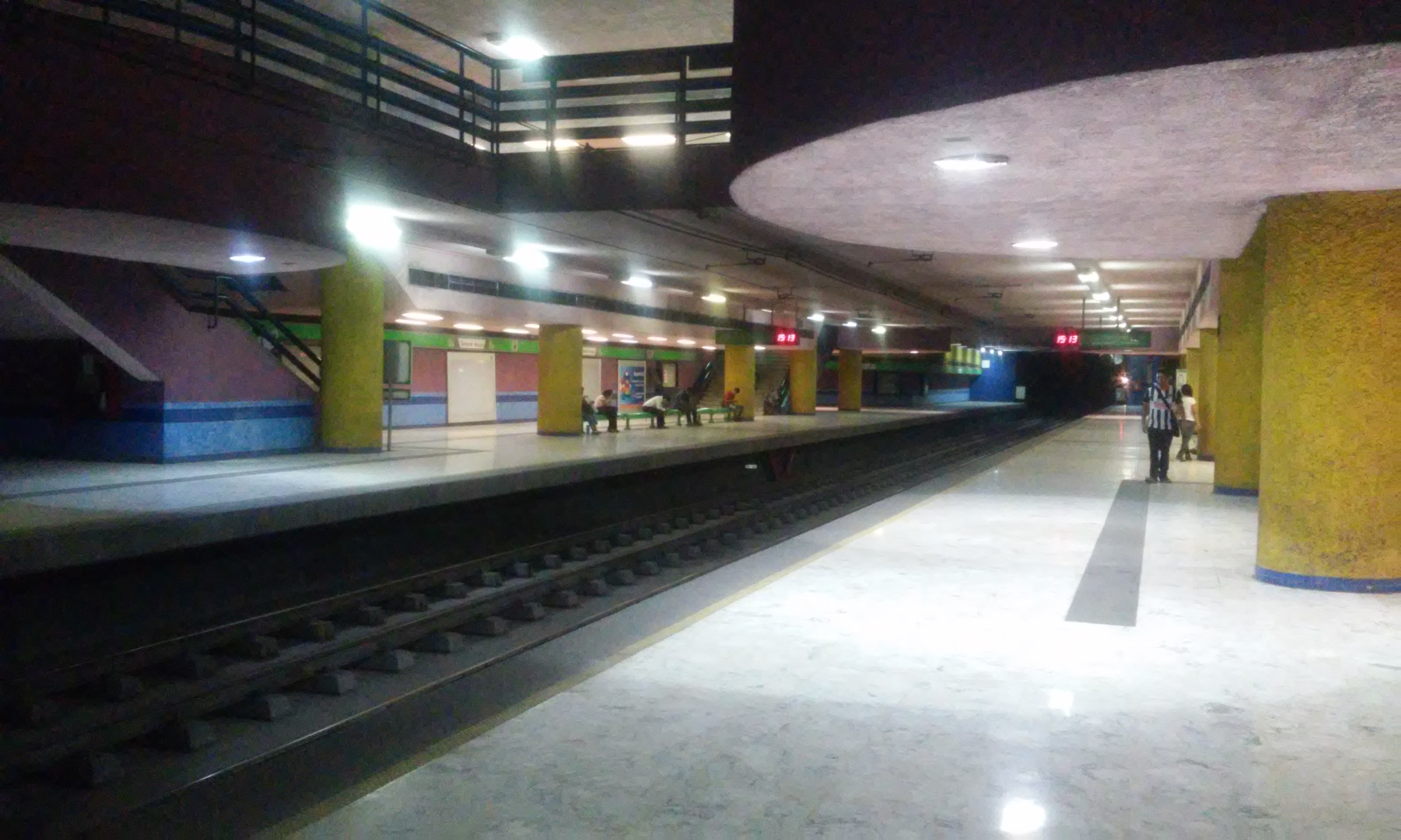 Interior de la estación